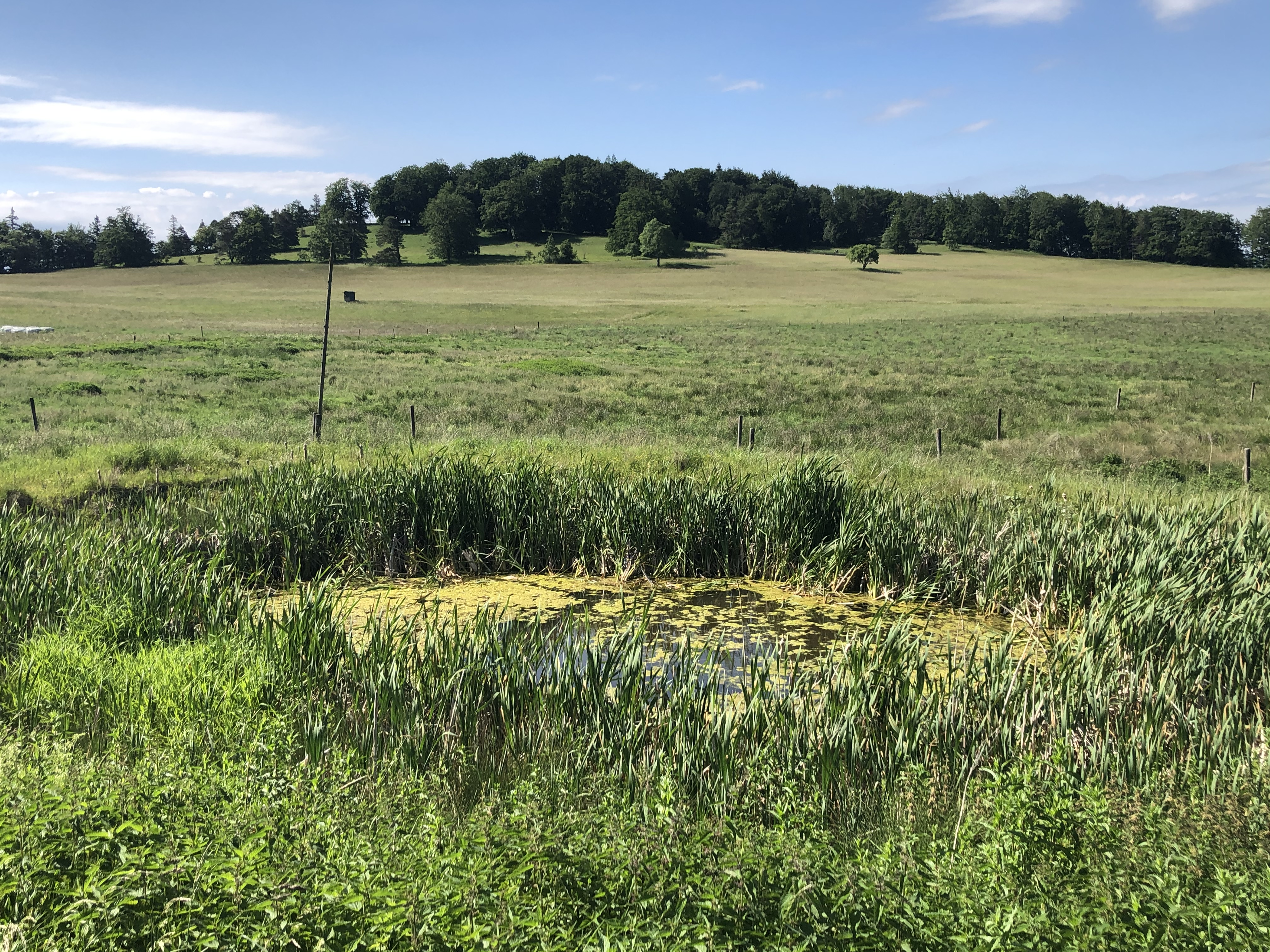 Der Blasenberg von der Albhochfläche aus gesehen, im Vordergrund das Naturschutzgebiet Geifitze. In der unteren Bildhälfte sieht man ein Flachmoor, das unter dem Namen Torfmoor Geifitze unterhalb des Schmiech-Ursprungs 2500 m WNW von Onstmettingen und der Nummer 6860/5062 beim LGRB als Geotop registriert ist.